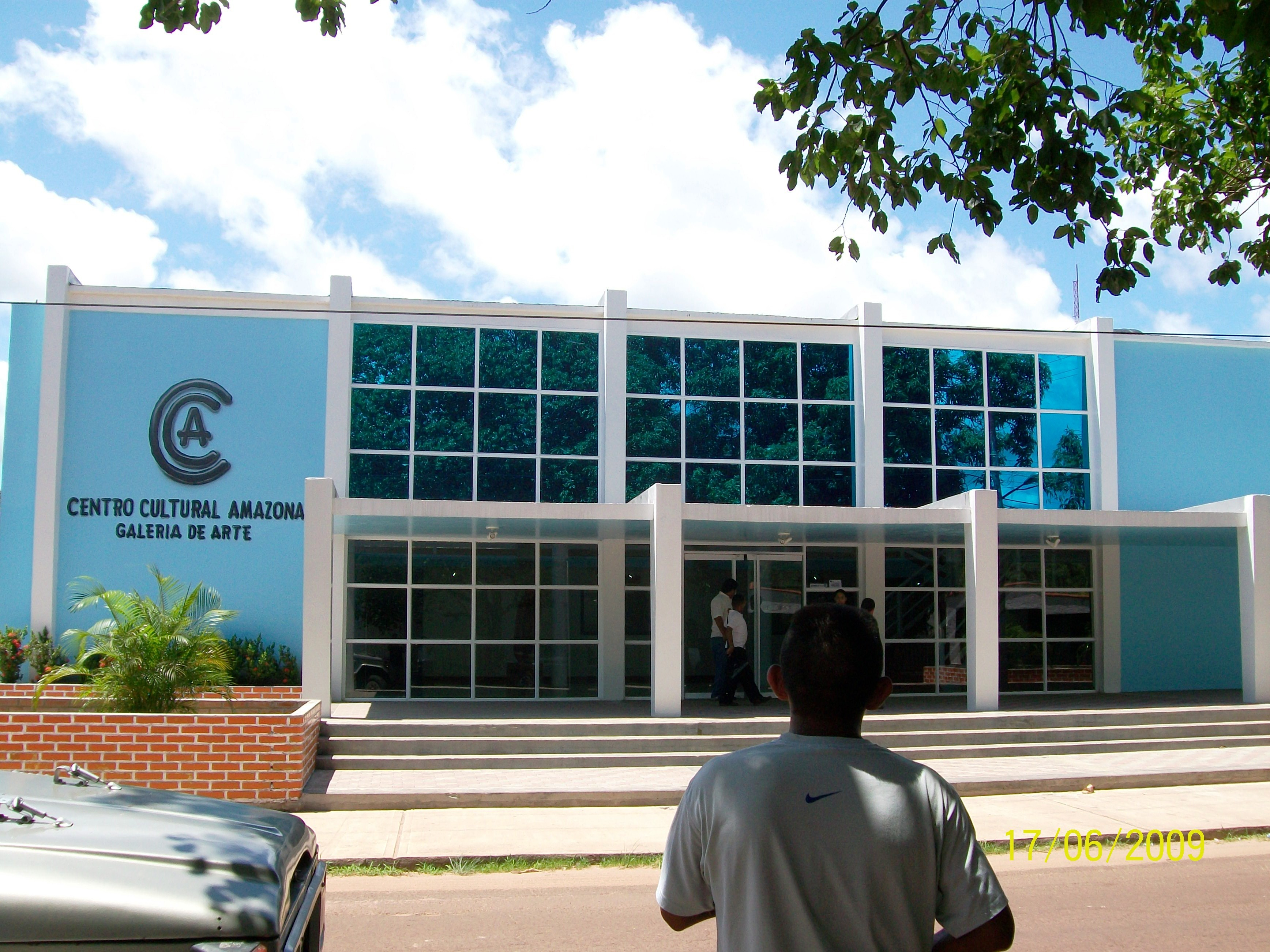 el nuevo centro cultural de amazonas,esta apenas en construccion,aunque esta parte esta concluida,este centro foma parte de un complejo del mismo nombre que se destina a mostrar la cultural etniologica del estado amazonas, a traves del arte,la escultura,y el diseño